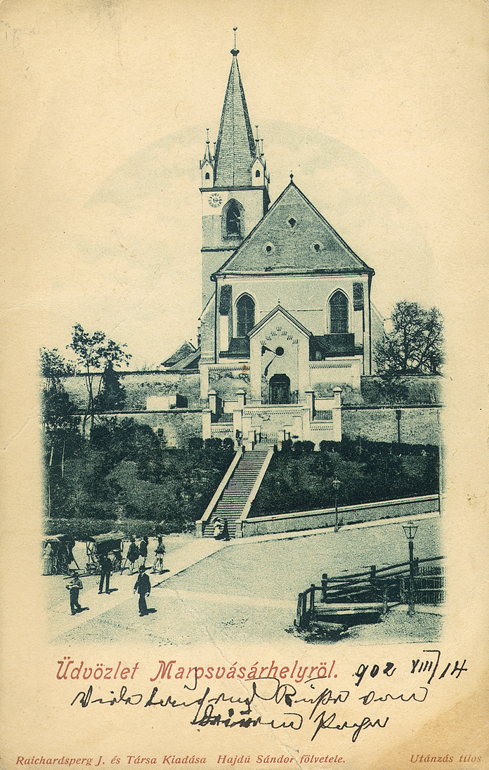 Marosvásárhely, 1902